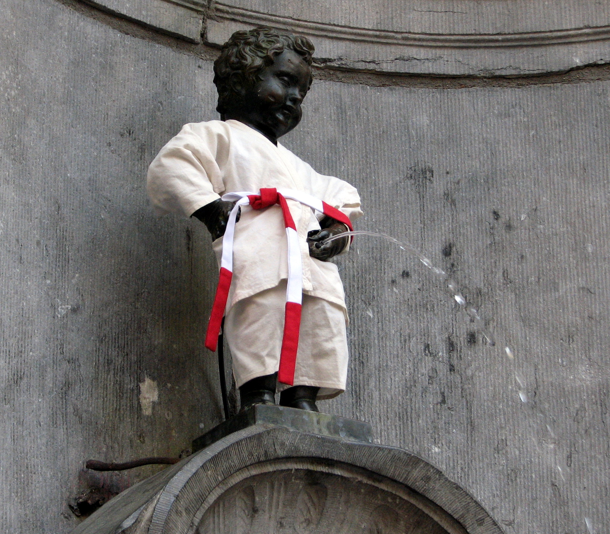 Manneken Pis in judopak Brussel